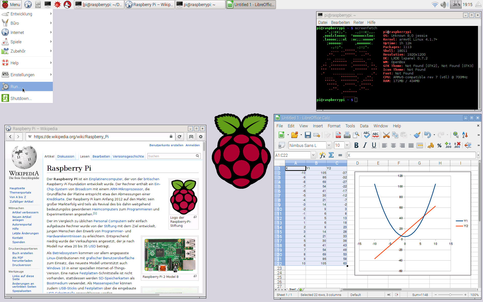 Raspbian 2015-09-24 Desktop mit Programmen